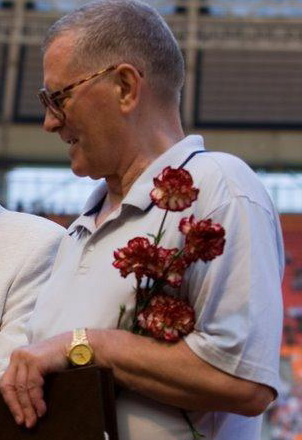 Viktor Ponedelnik